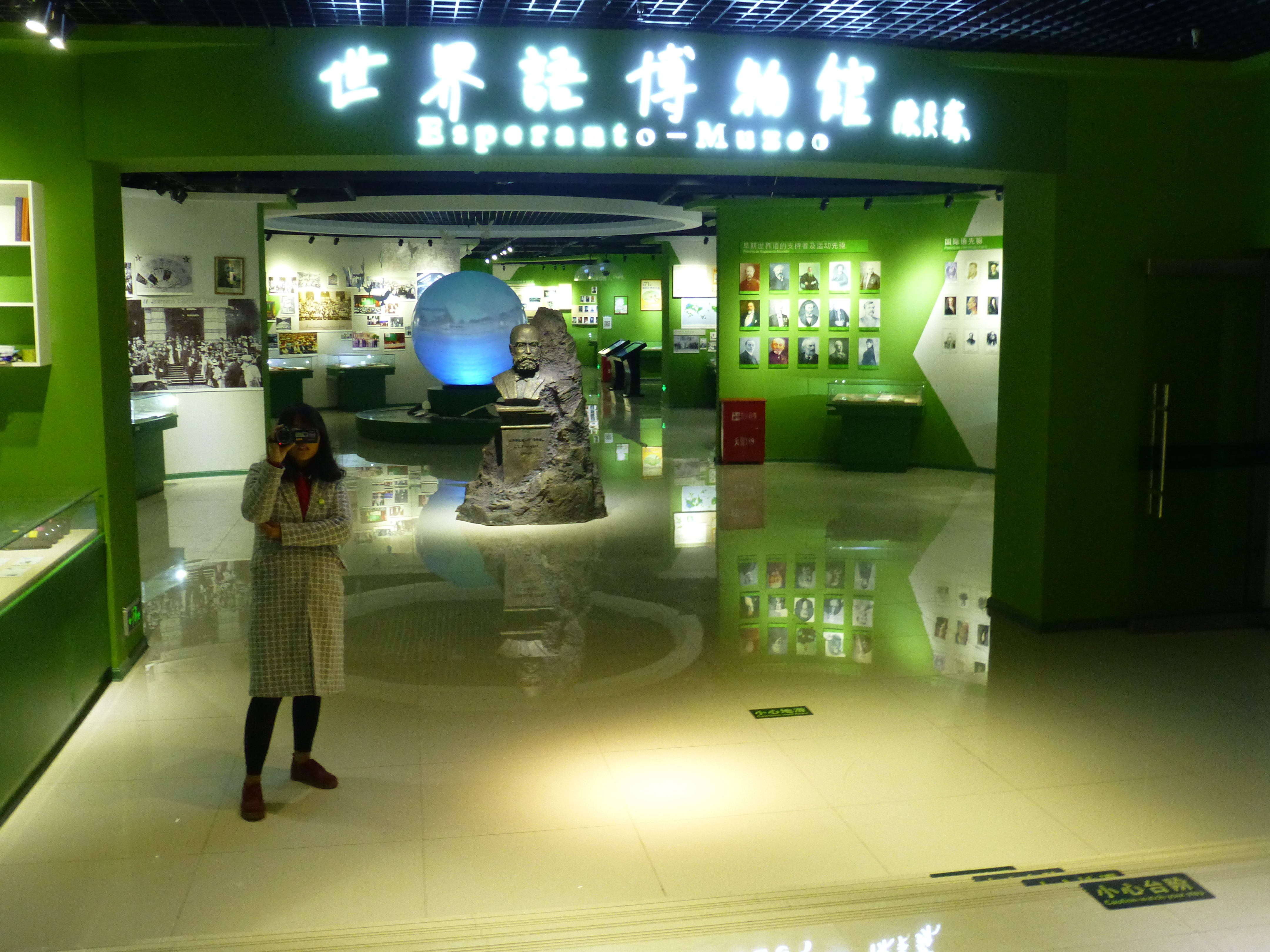 Intérieur du musée Espéranto à l'université de Zaozhuang, Chine